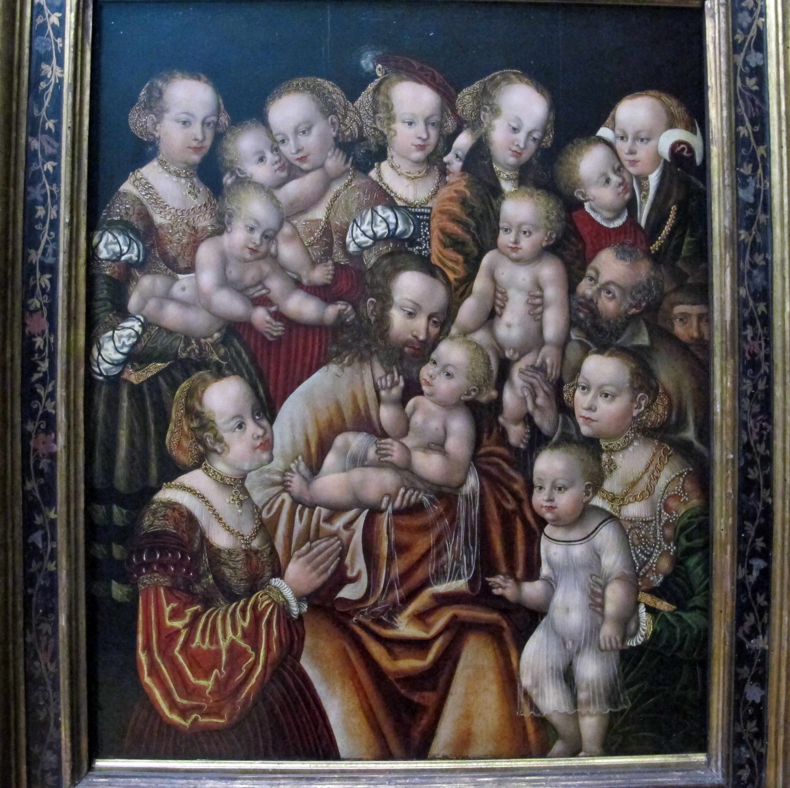 pittura tedesca al Louvre, Parigi